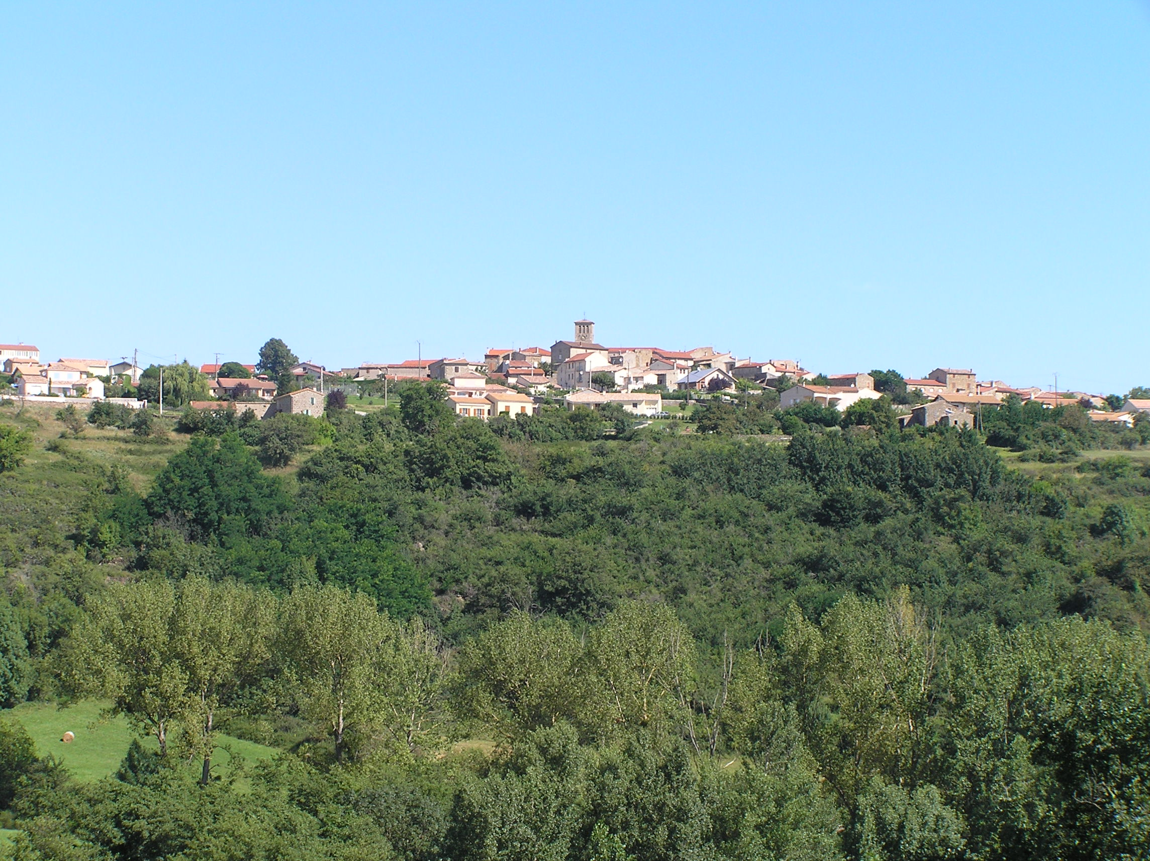 Ardoix, Ardèche, France